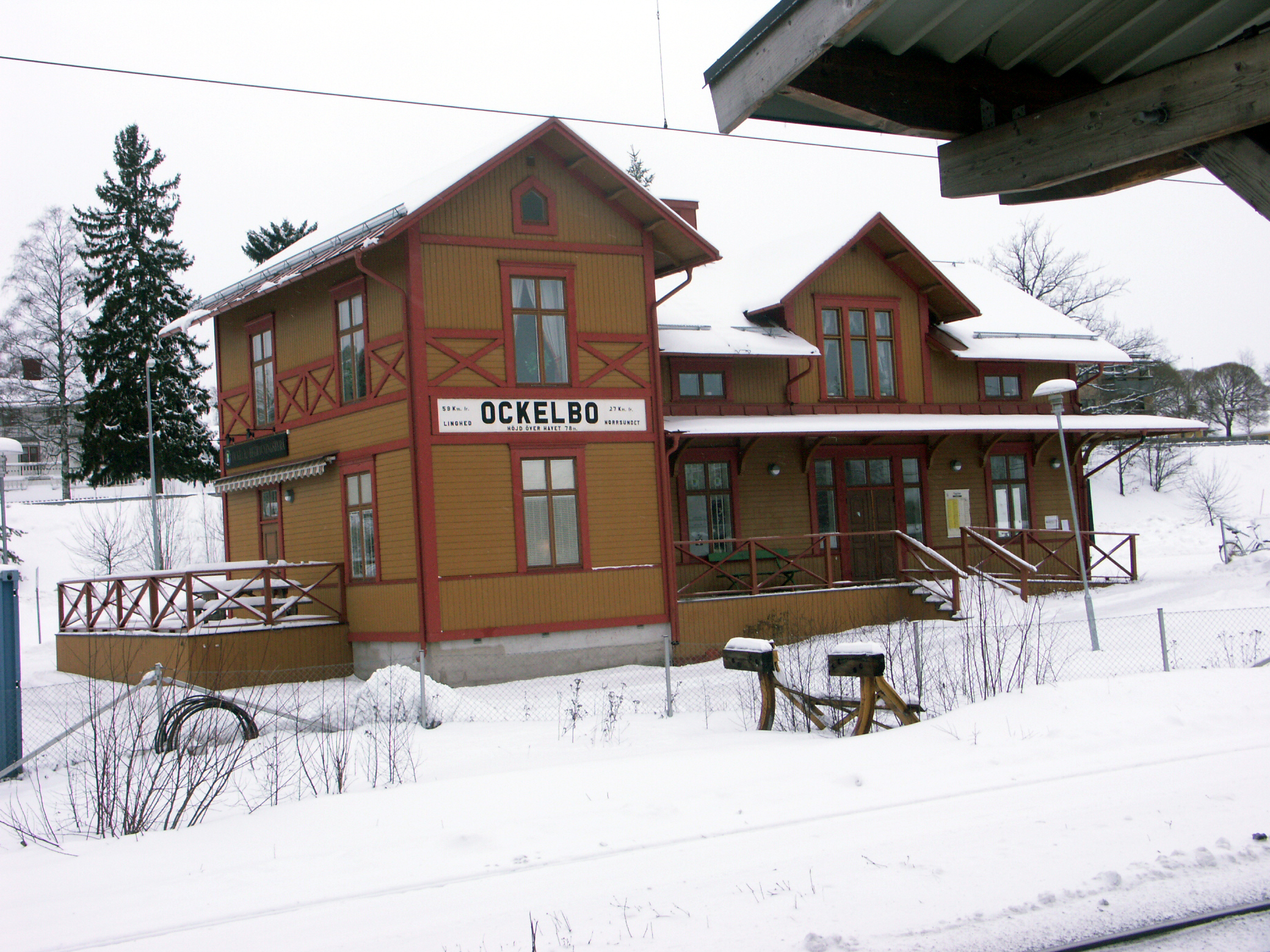 Ockelbo stationsbygnad